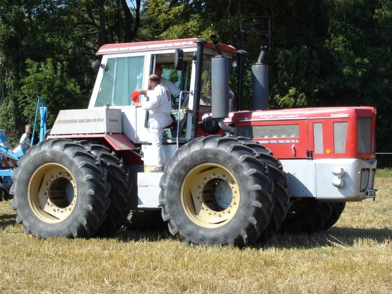 Schlüter Profi Trac 5000 TVL II beim Schlüter-Feldtag 2004